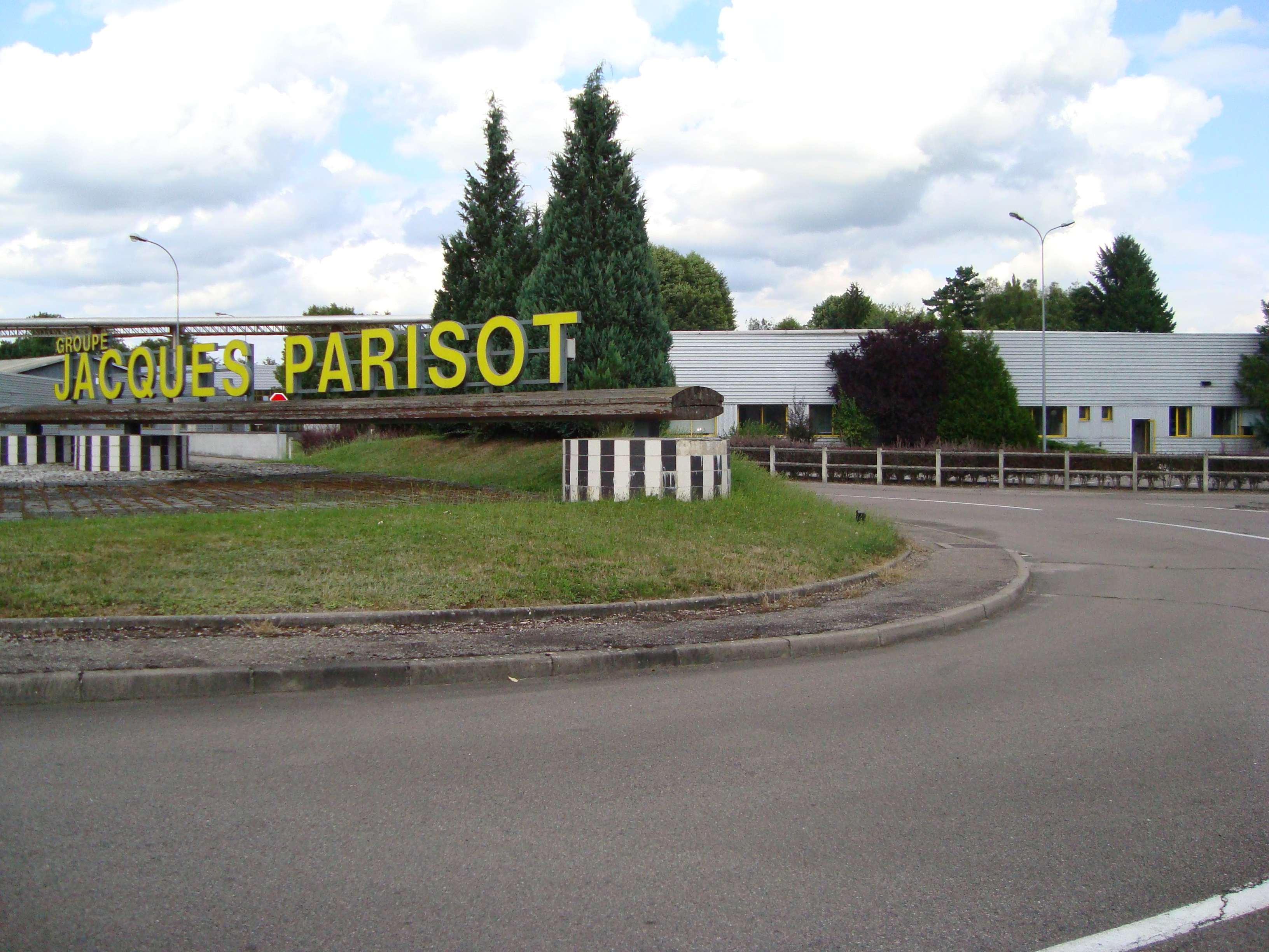 L'entreprise de meubles Parisot à Saint-Loup-sur-Semouse